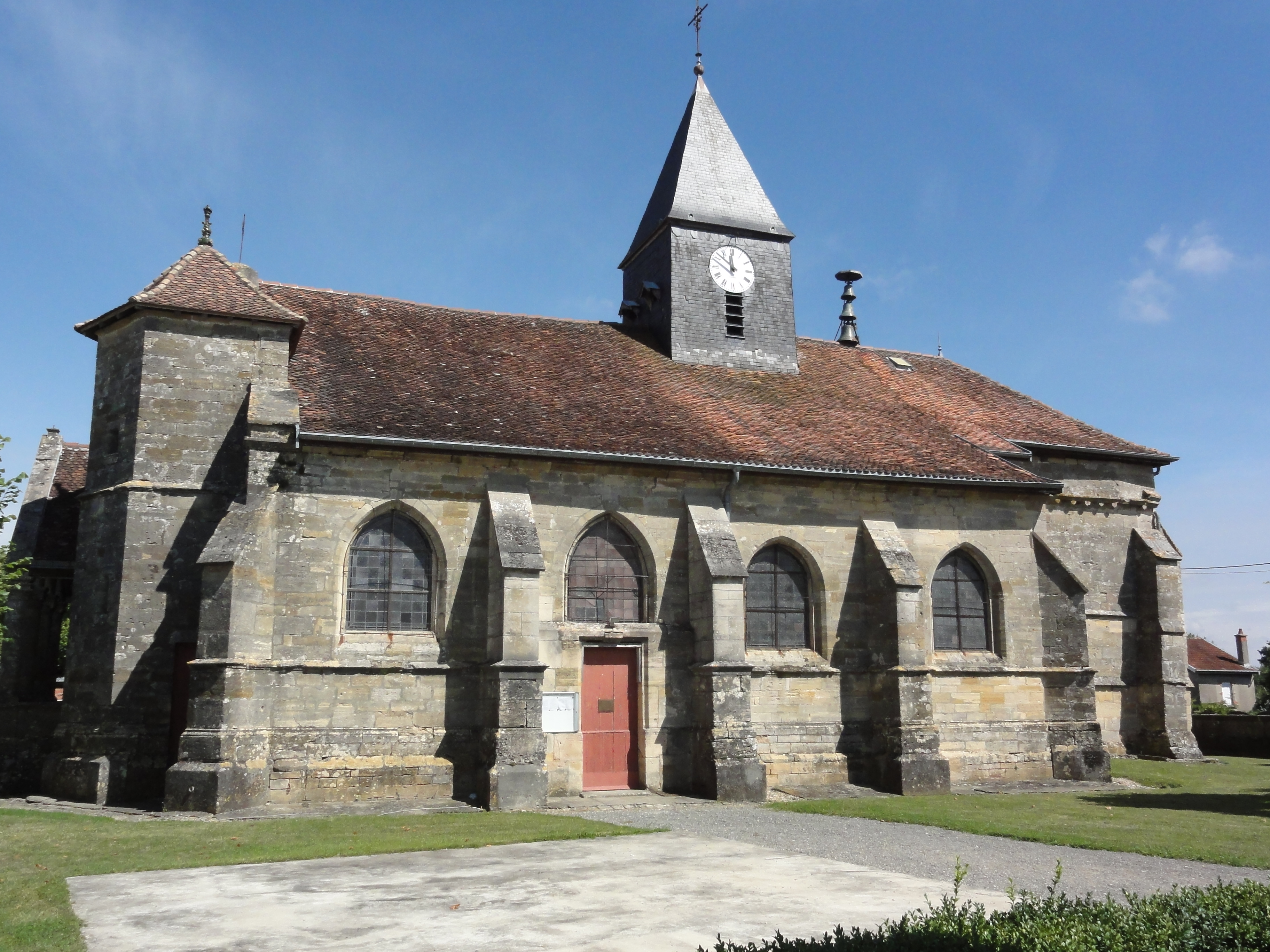 Église Notre-Dame-de-l'Assomption d'Andernay .